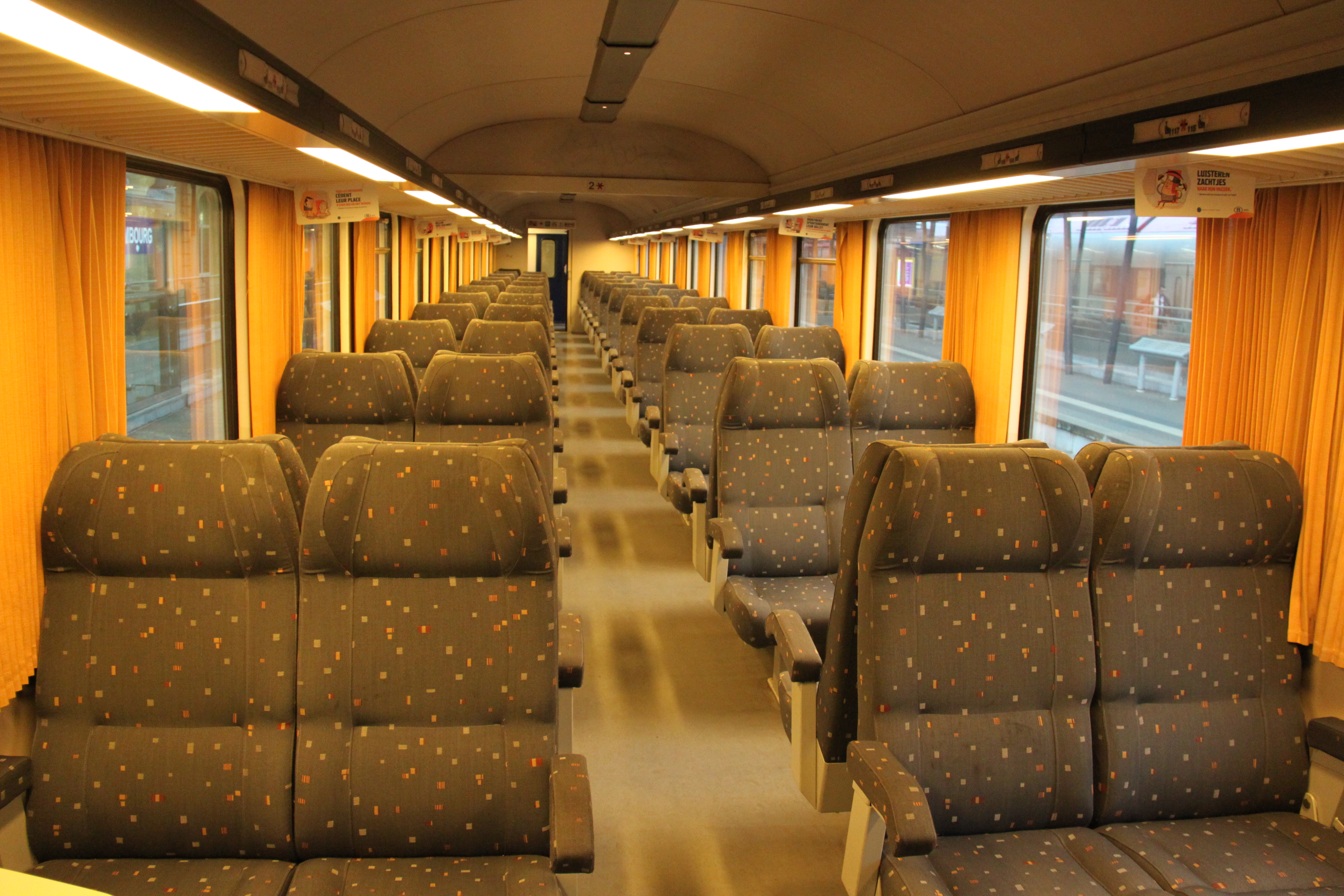 Interieur tweede klasse van een I10-B11 van de NMBS.